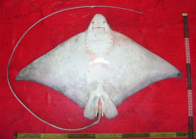 Полосатый летучий скат